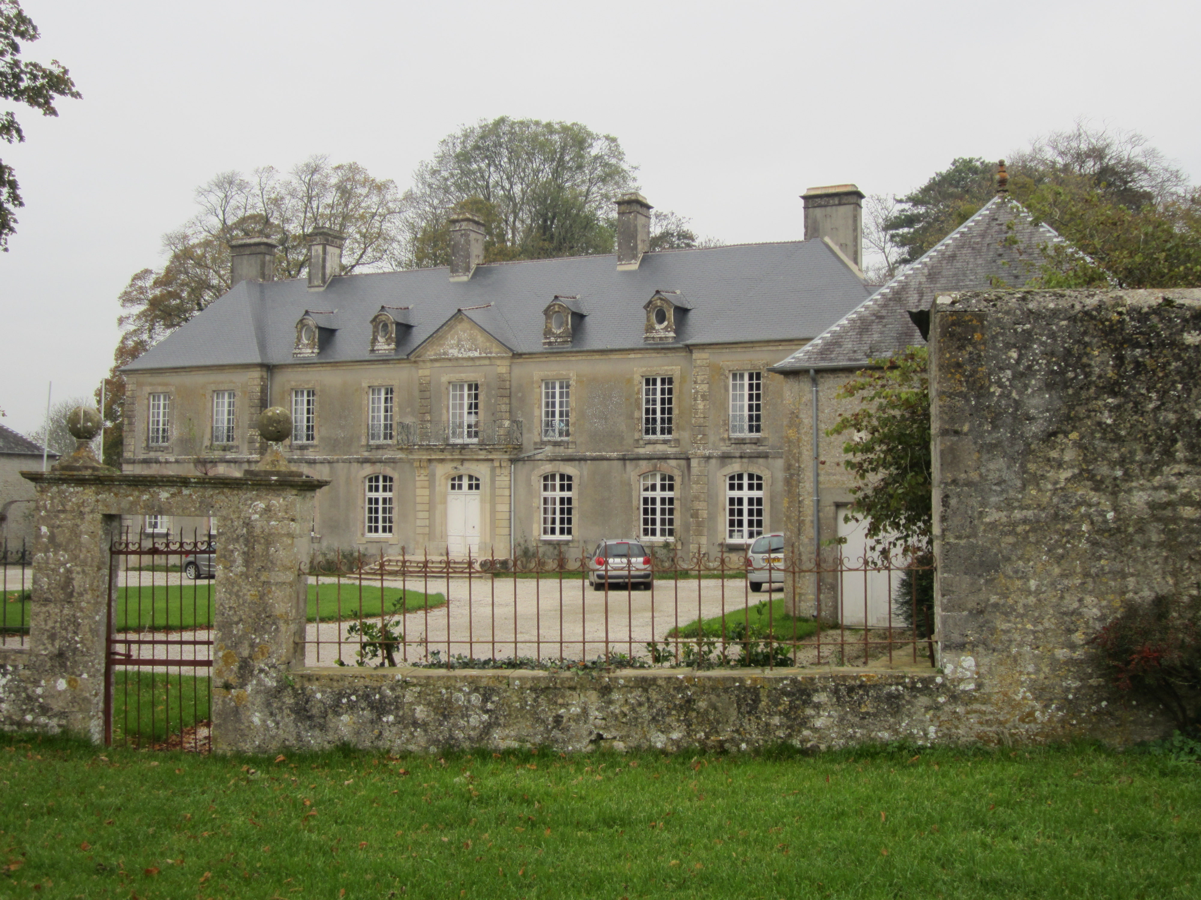 Château de Grandval, Neuville-au-Plain, Manche